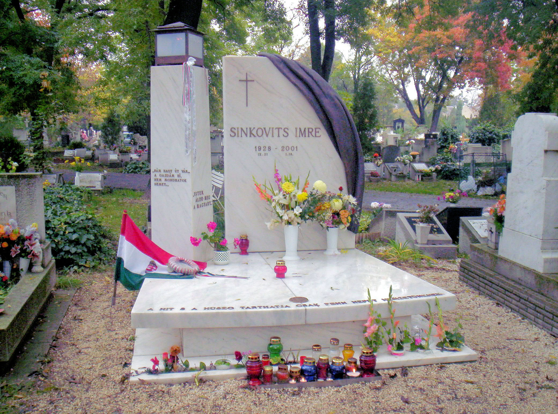 Sinkovits Imre sírja Óbudán. – photo taken by uploader User:Csanády in 2005.